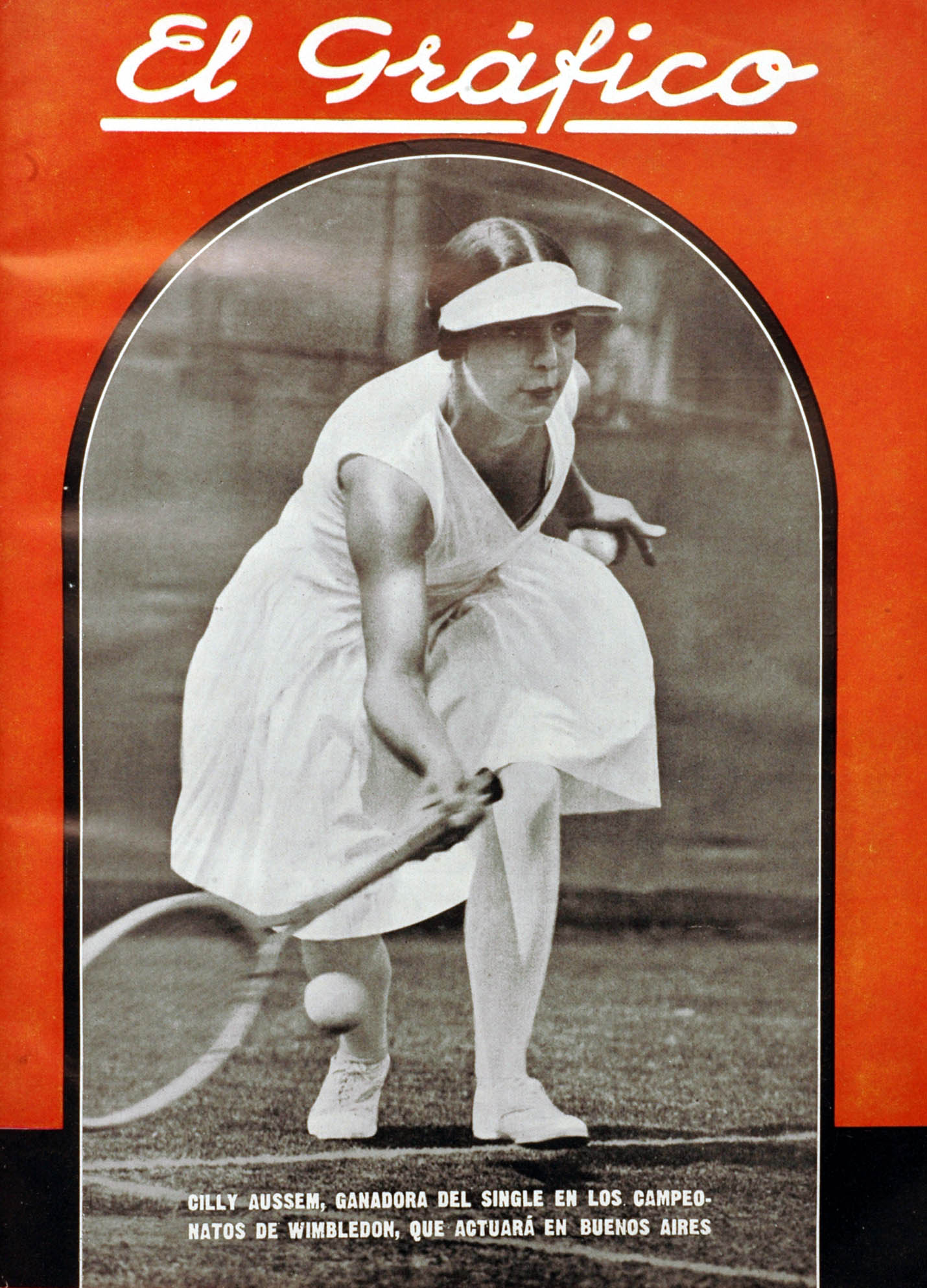 El Grafico del 29 de Agosto de 1931. Edicion 633